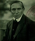 Richard Pollak-Karlín